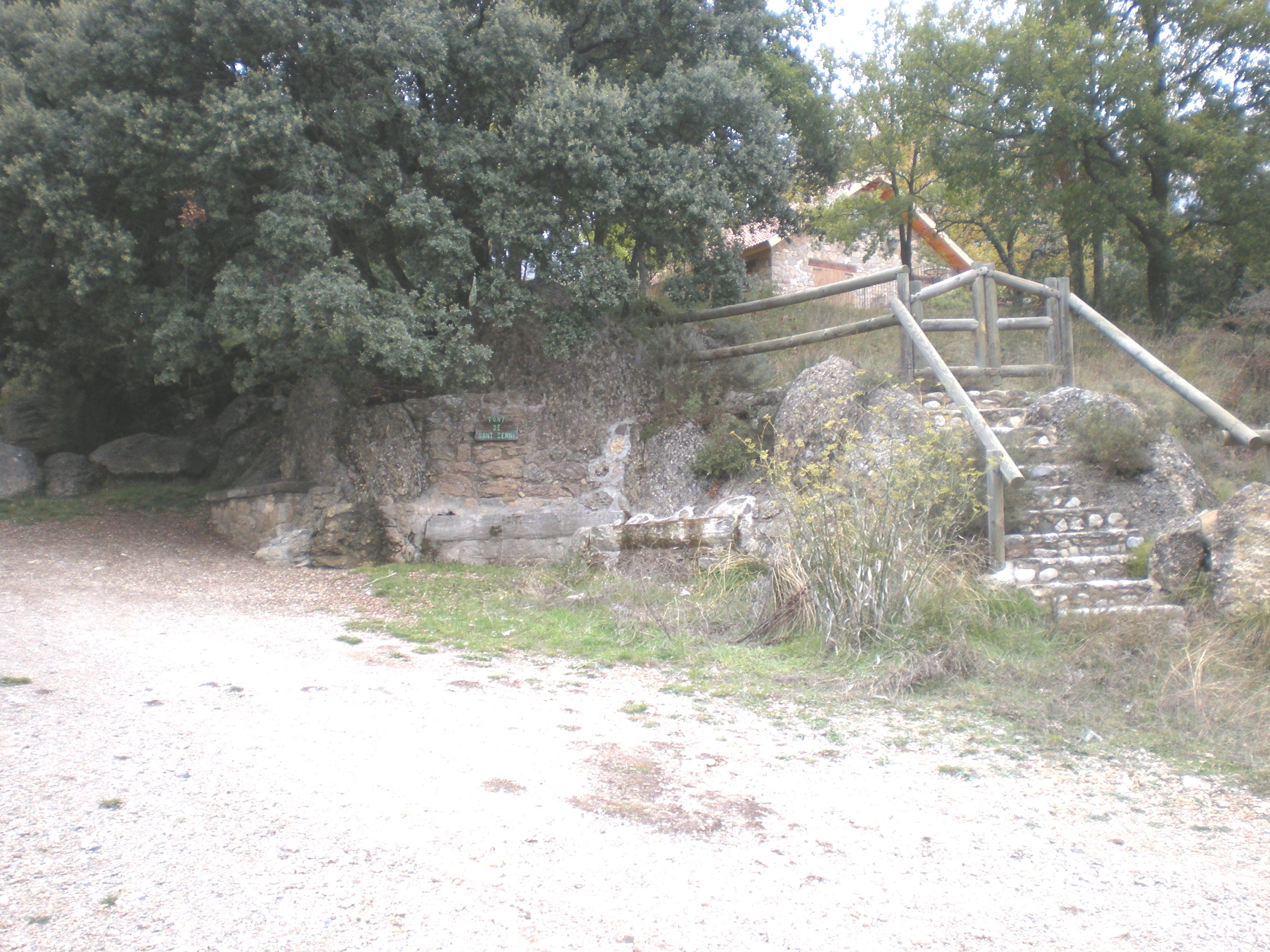 La font de Sant Serni, al terme municipal de Guixers (Solsonès).